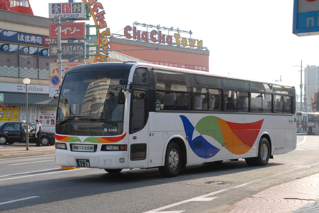 阪九フェリー送迎 砂津にて撮影